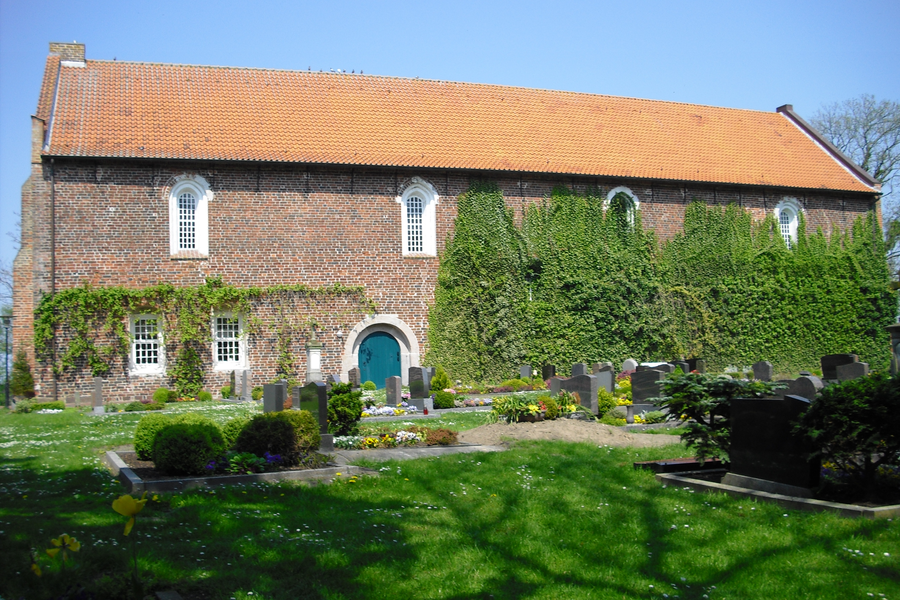 Kirche der Evangelisch-Lutherischen Kirchengemeinde Westochtersum, Landkreis Wittmund, Deutschland